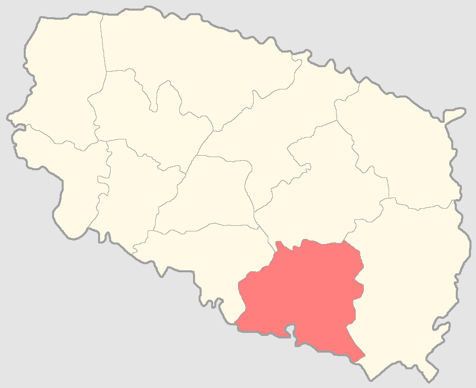 Спасский уезд на карте Казанской губернии